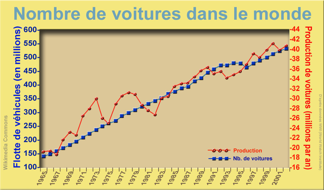 Graphe représentant en rouge le nombre de voiture produite par an, et en bleu le nombre de voiture en circulation, d'après des données compilées par le World Watch institute. On voit que l'effet crise et les régimes d'aides à l'industrie automobile ont eu des effets sur la production, mais non sur la croissance du nombre de véhicules. Cette évolution s'est accompagnée d'un fort développement du maillage routier, facteur de fragmentation écopaysagère et d'une augmentation régulière des émissions de GES dans le monde.